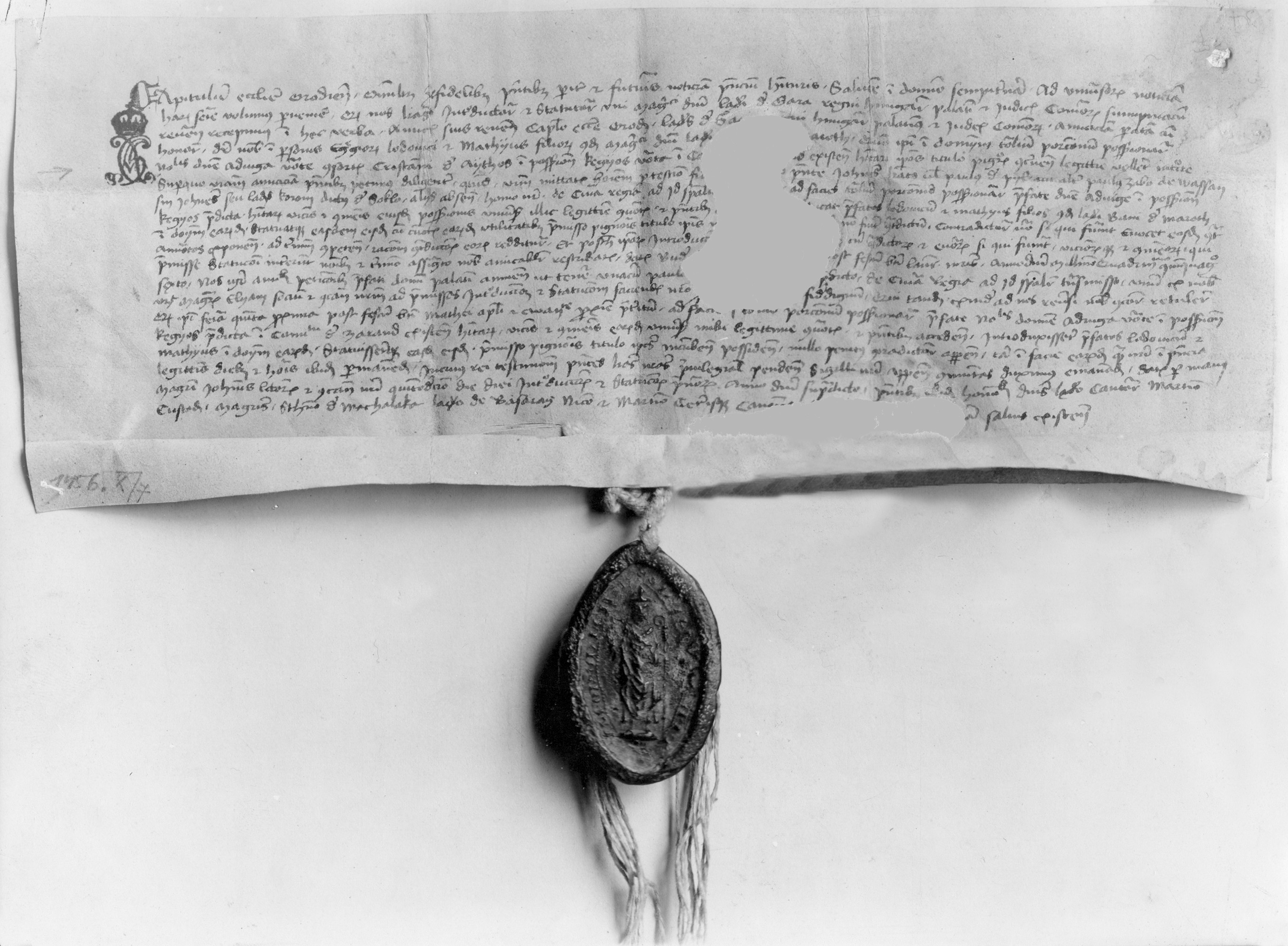 1456. október 7. Az aradi káptalan bizonyítja, hogy néhai Maróthi lászló fiait (Lászlót és Mátét) beiktatta az – Ajtósi {:Aytos:} Keresztélyné (Aviga) által elzálogosított – zaránd megyei Kégyós („Kegyos”) birtokba.